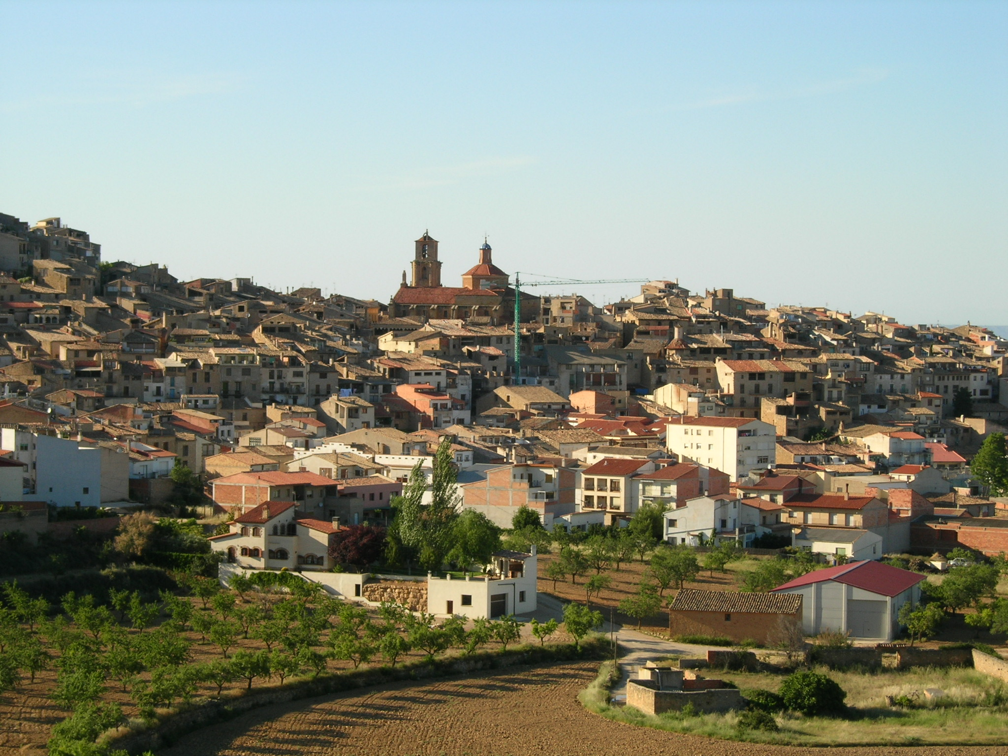 Vila de Calaceit